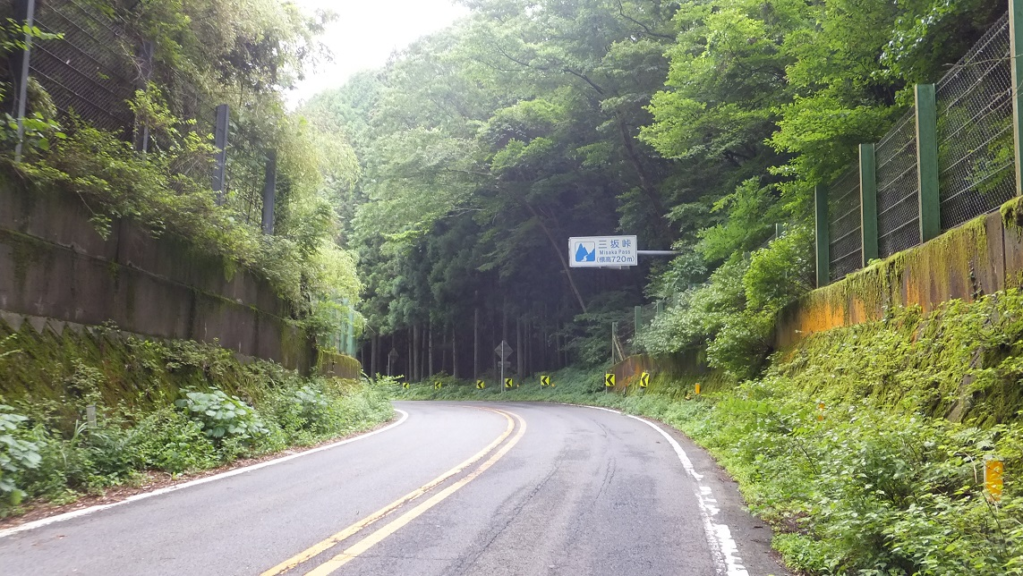 愛媛県の三坂峠